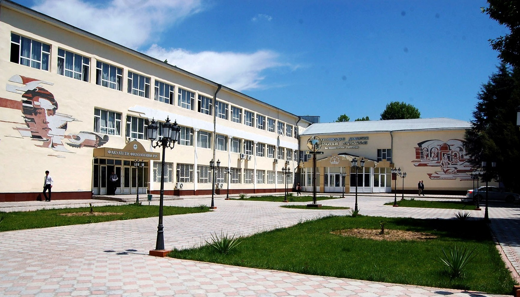 Здание ТГИЯ им. С. Улугзода